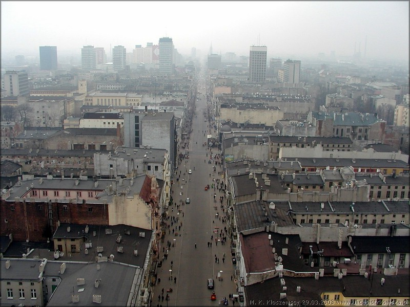 Lodz - ul. Piotrkowska widok w stronę południową